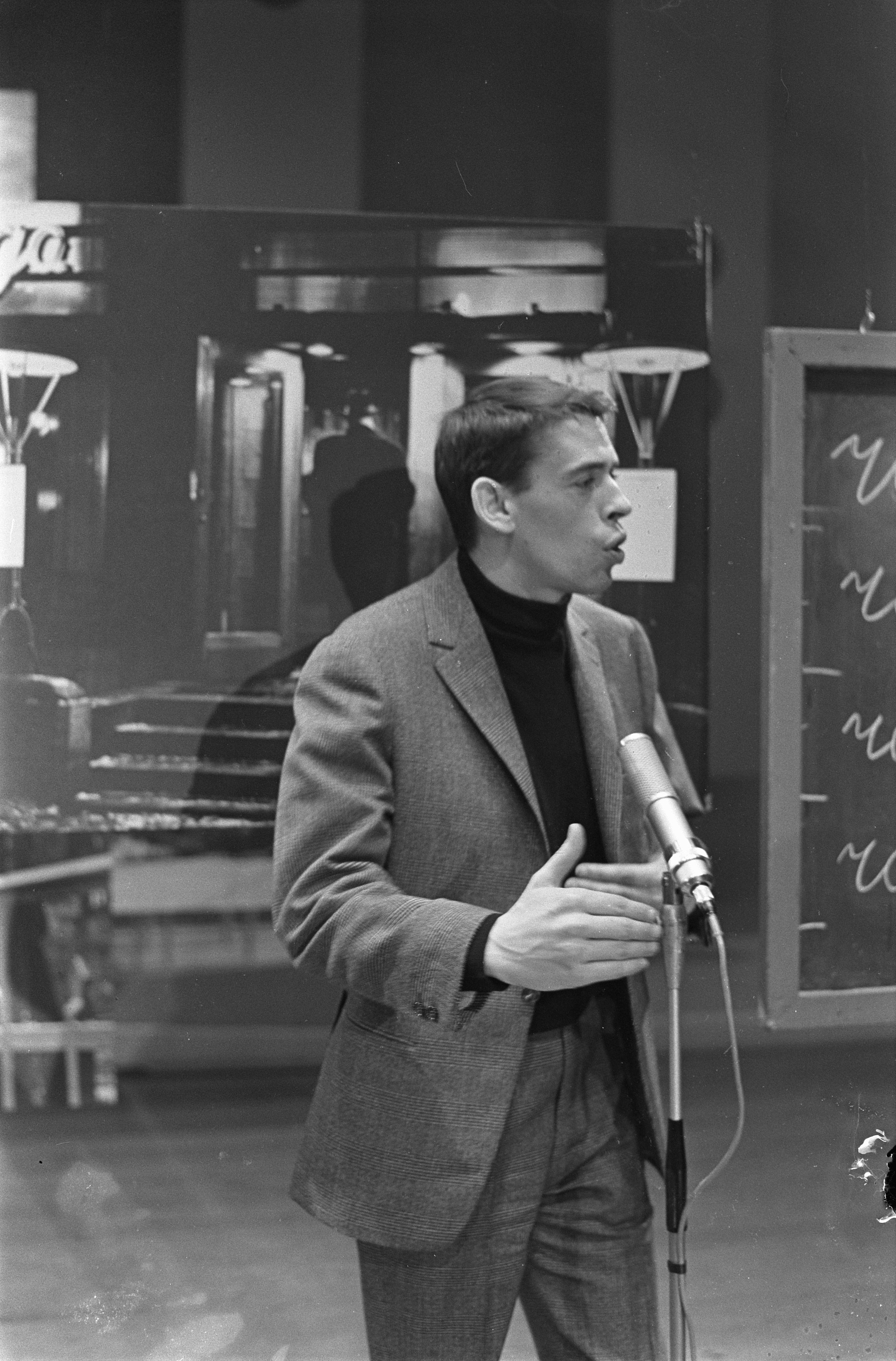 Collectie / Archief : Fotocollectie Anefo Reportage / Serie : [ onbekend ] Beschrijving : TV-uitzending "Domino" Jacques Brel tijdens de opname in Amsterdam, Marcanti Datum : 20 februari 1963 Locatie : Amsterdam, Noord-Holland Trefwoorden : TV-programma's, zangers Persoonsnaam : Brel, Jacques Fotograaf : Bilsen, Joop van / Anefo Auteursrechthebbende : Nationaal Archief Materiaalsoort : Negatief (zwart/wit) Nummer archiefinventaris : bekijk toegang 2.24.01.05 Bestanddeelnummer : 914-8396